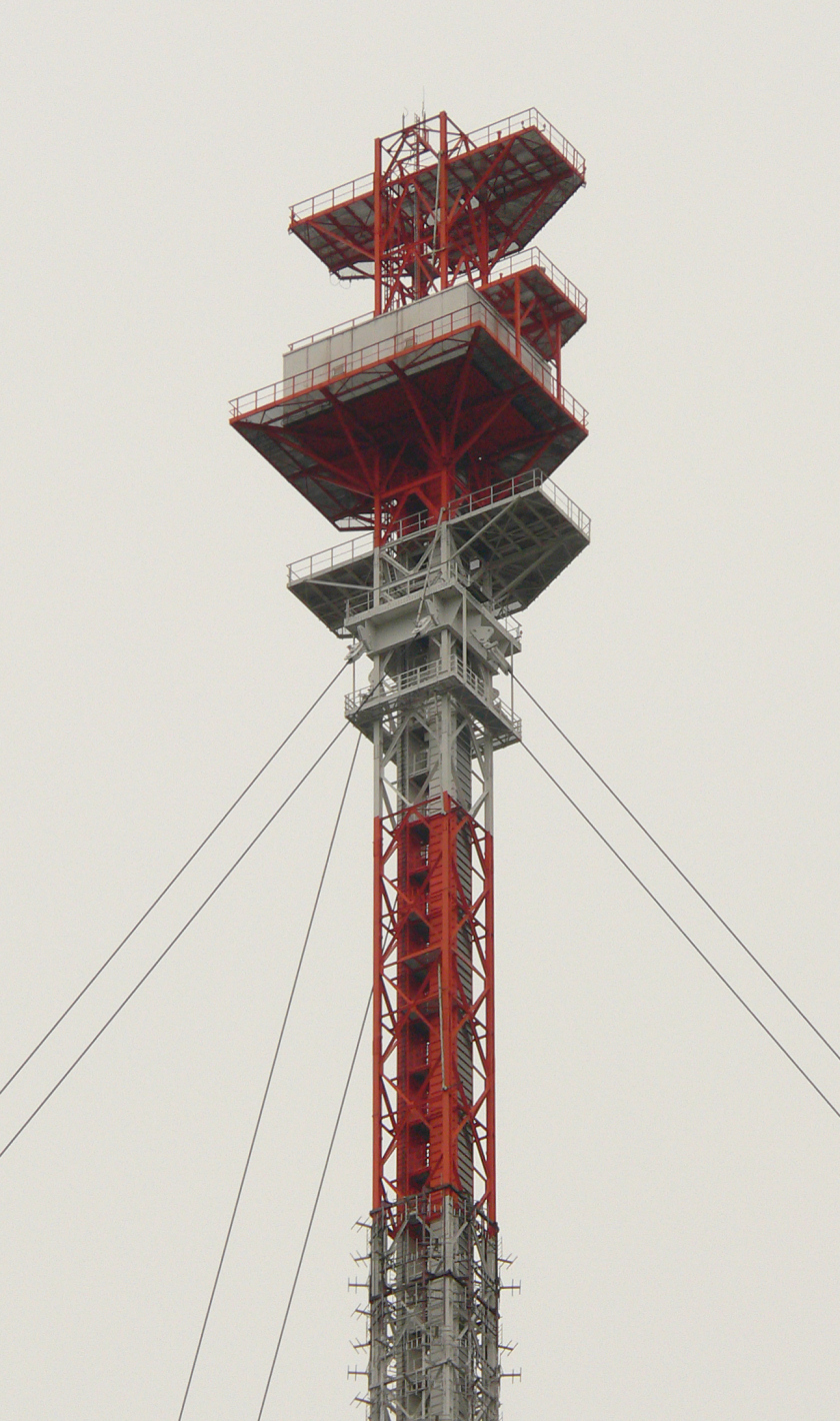 Sender Höhbeck